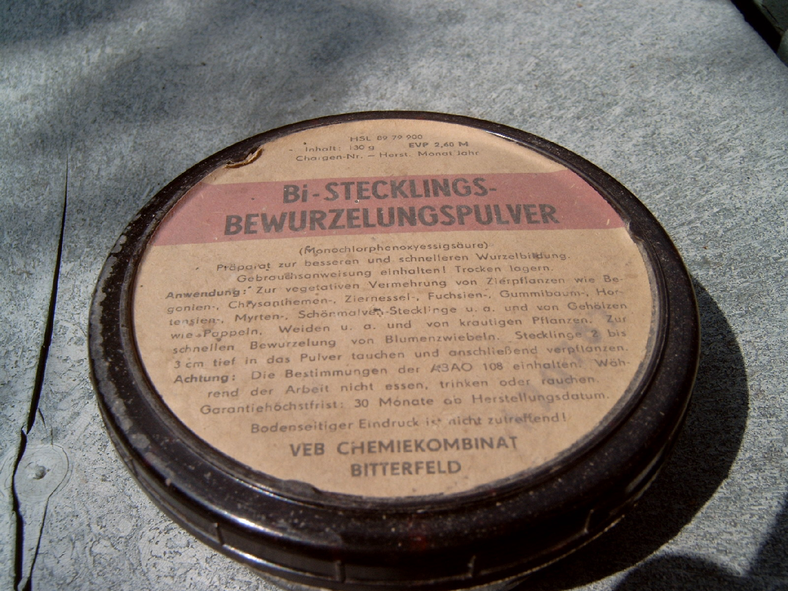 Bi-Stecklingsbewurzelungspulver